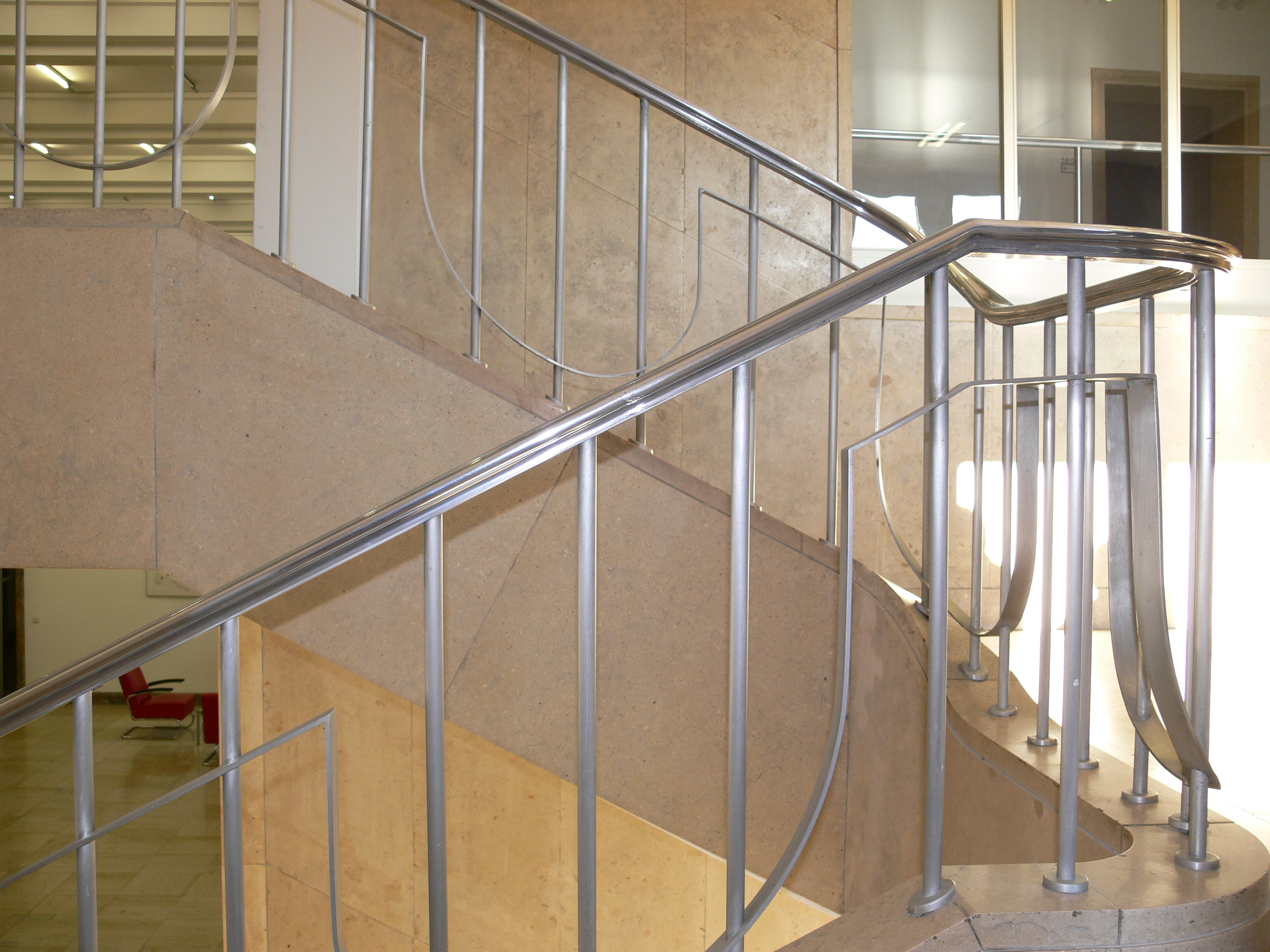 Geländer in einem Treppenhaus des Bundesministeriums der Finanzen (Detlev-Rohwedder-Haus; früher Reichsluftfahrtministerium bzw. Haus der Ministerien der DDR), Wilhelmstraße 97/Leipziger Straße, Berlin.